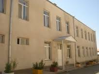 դպրոցի պատկեր